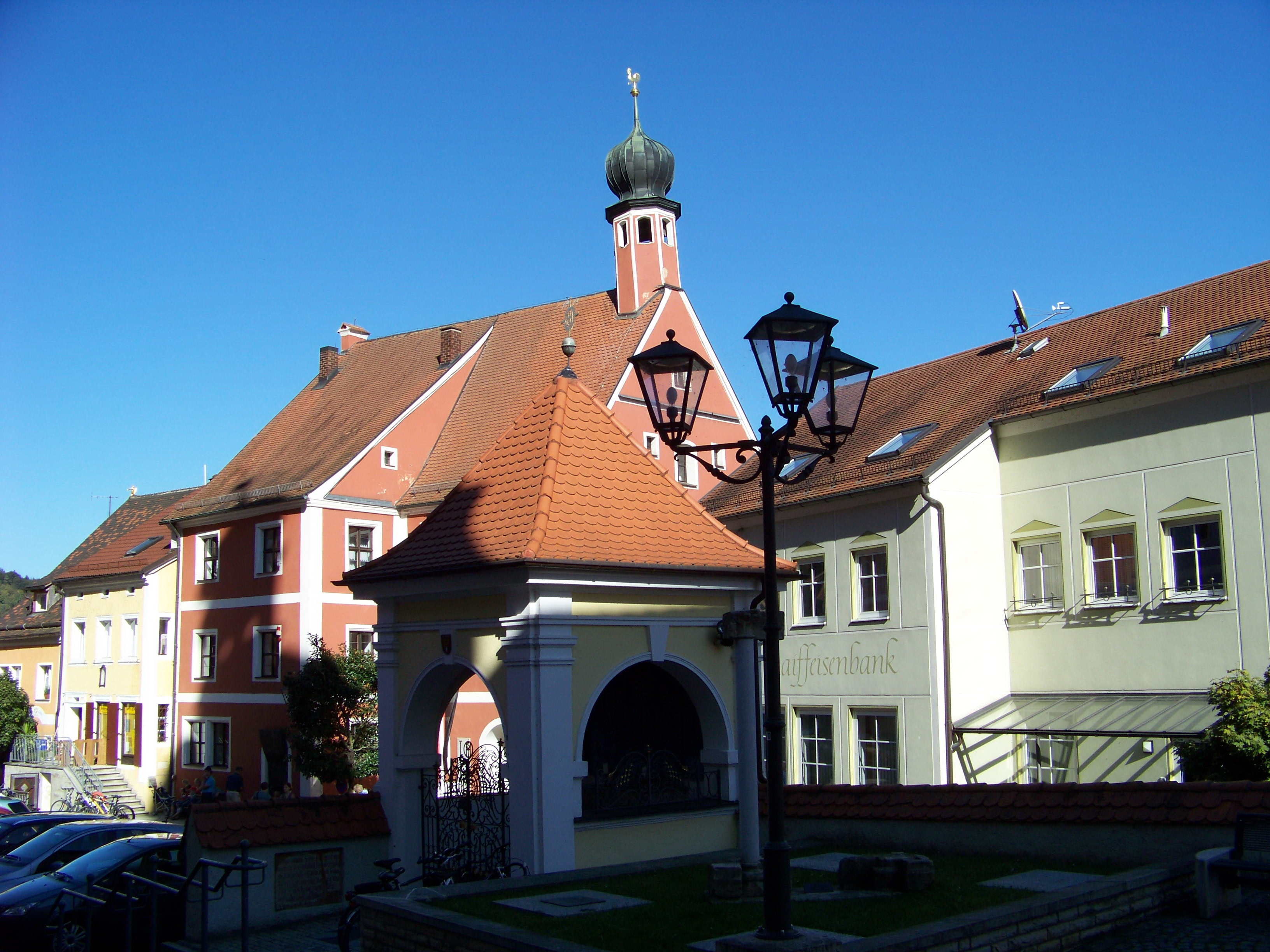 Kallmünz. Kriegerdenkmal, offenes Gehäuse mit Zeltdach, Pilastergliederung und Ziergitter, neubarock, um 1920, am Unterbau historische Reliefs.